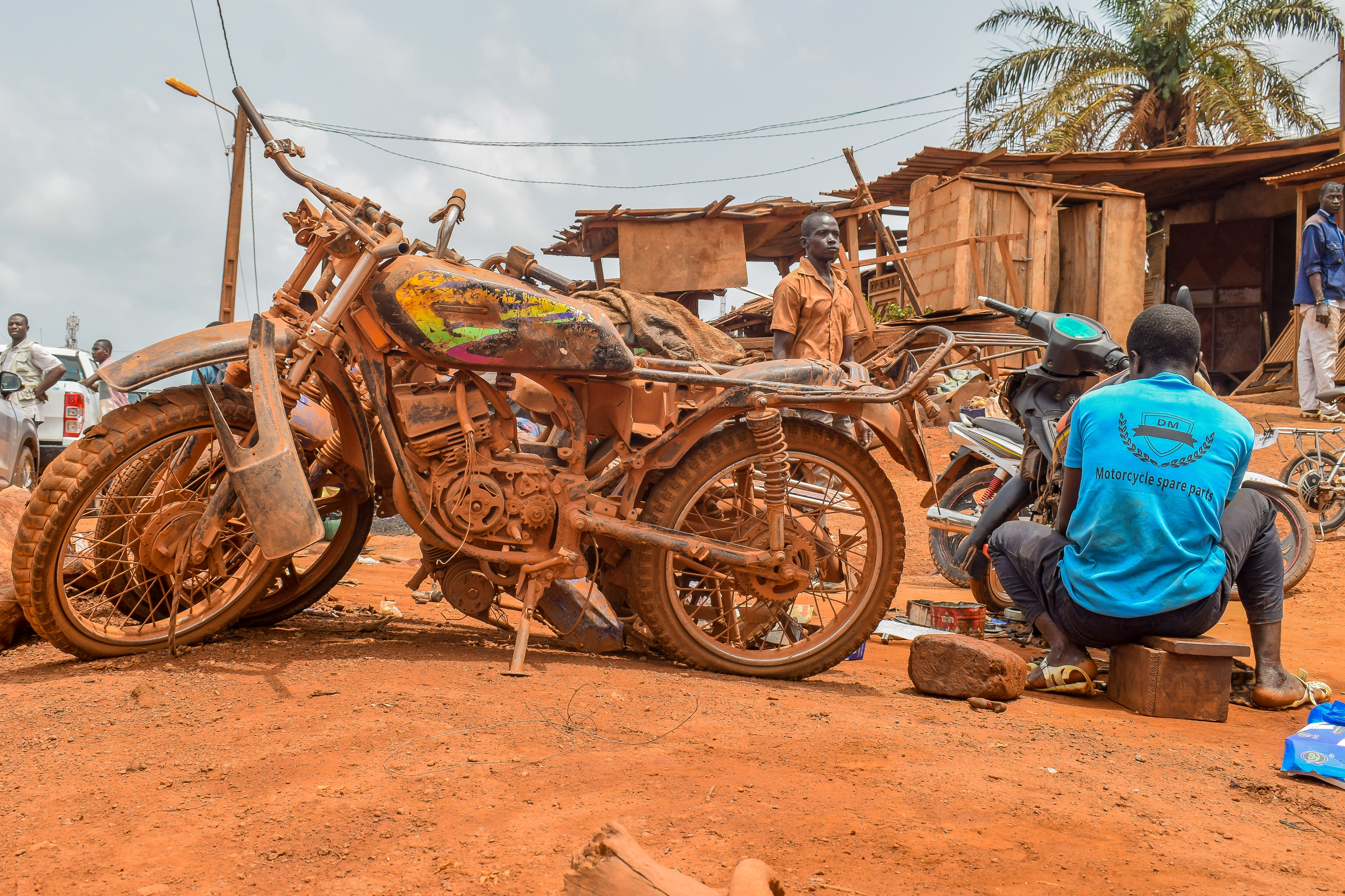 Exposition de motos endommagées en bordure de route poussiéreuse. This is an image with the theme "Africa on the Move or Transport" from: Ivory Coast